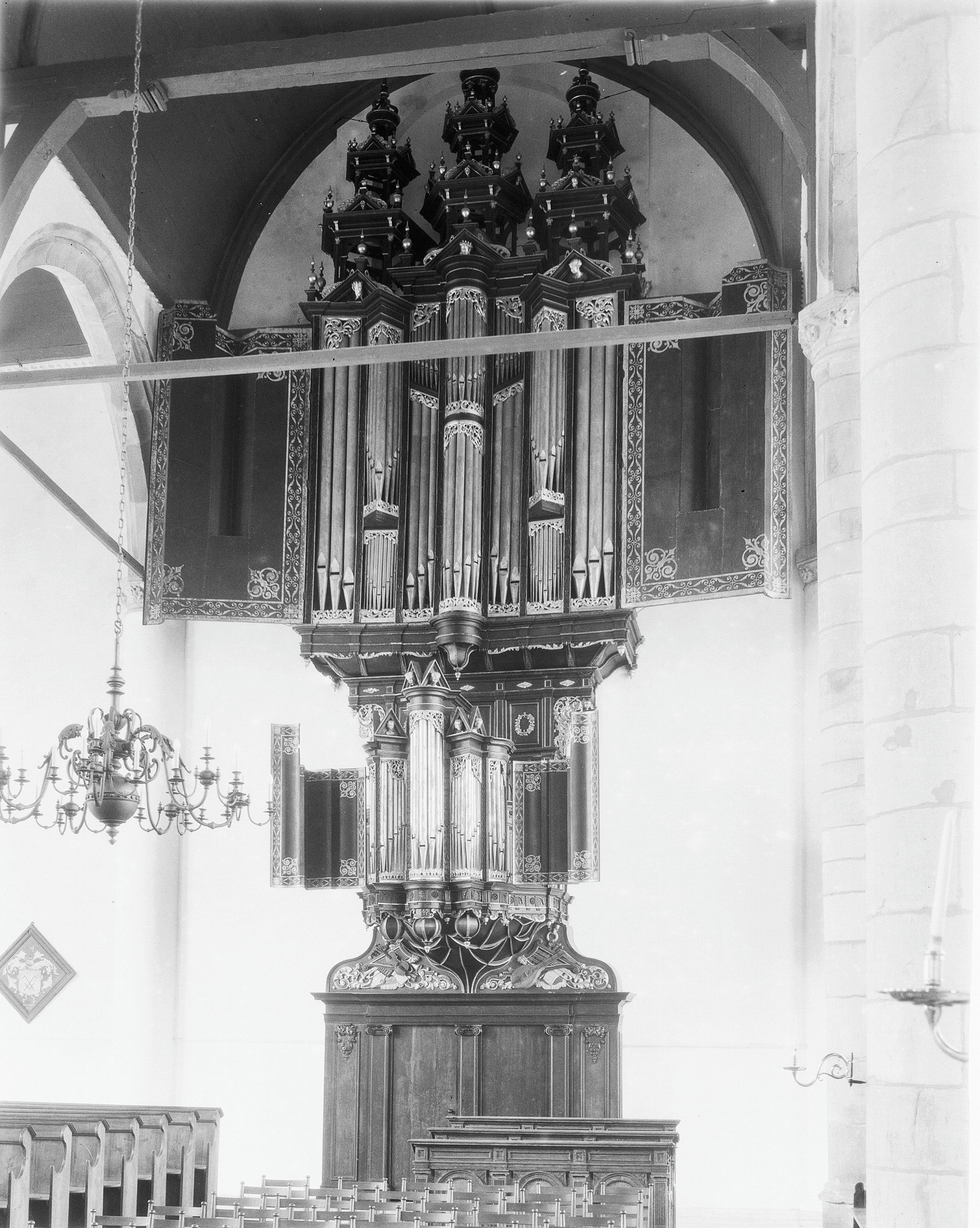 Westerkerk: interieur en orgel